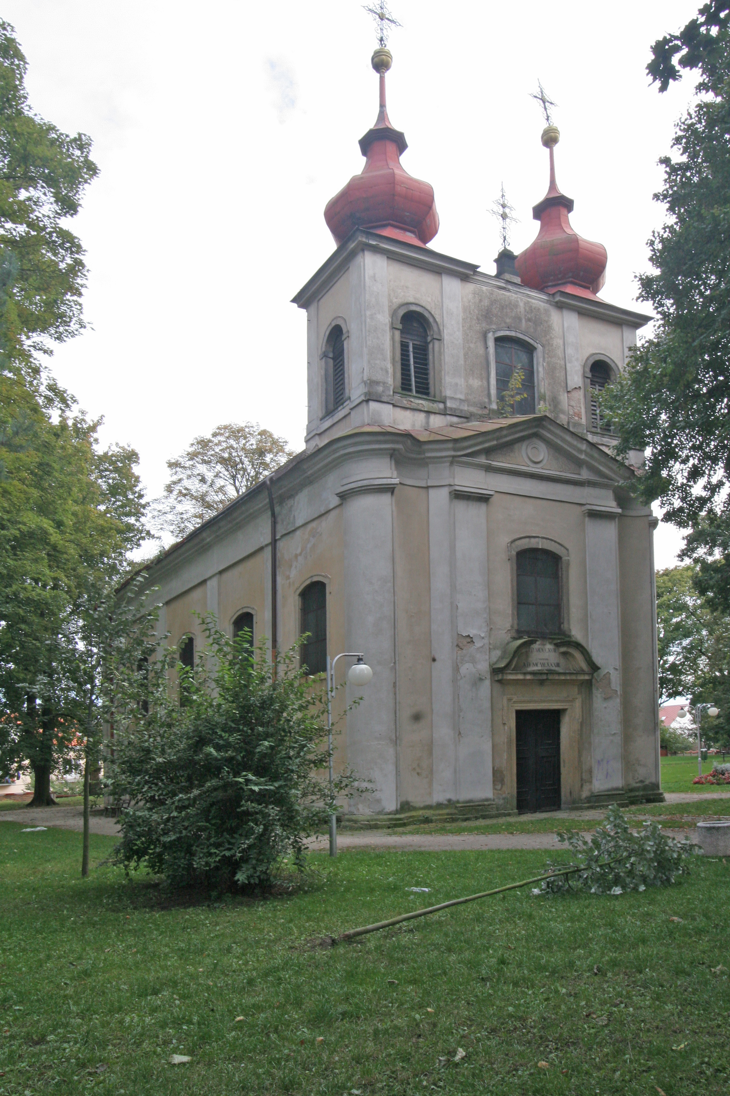 Kostel Nejsvětější Trojice (Nový Bydžov), Nový Bydžov